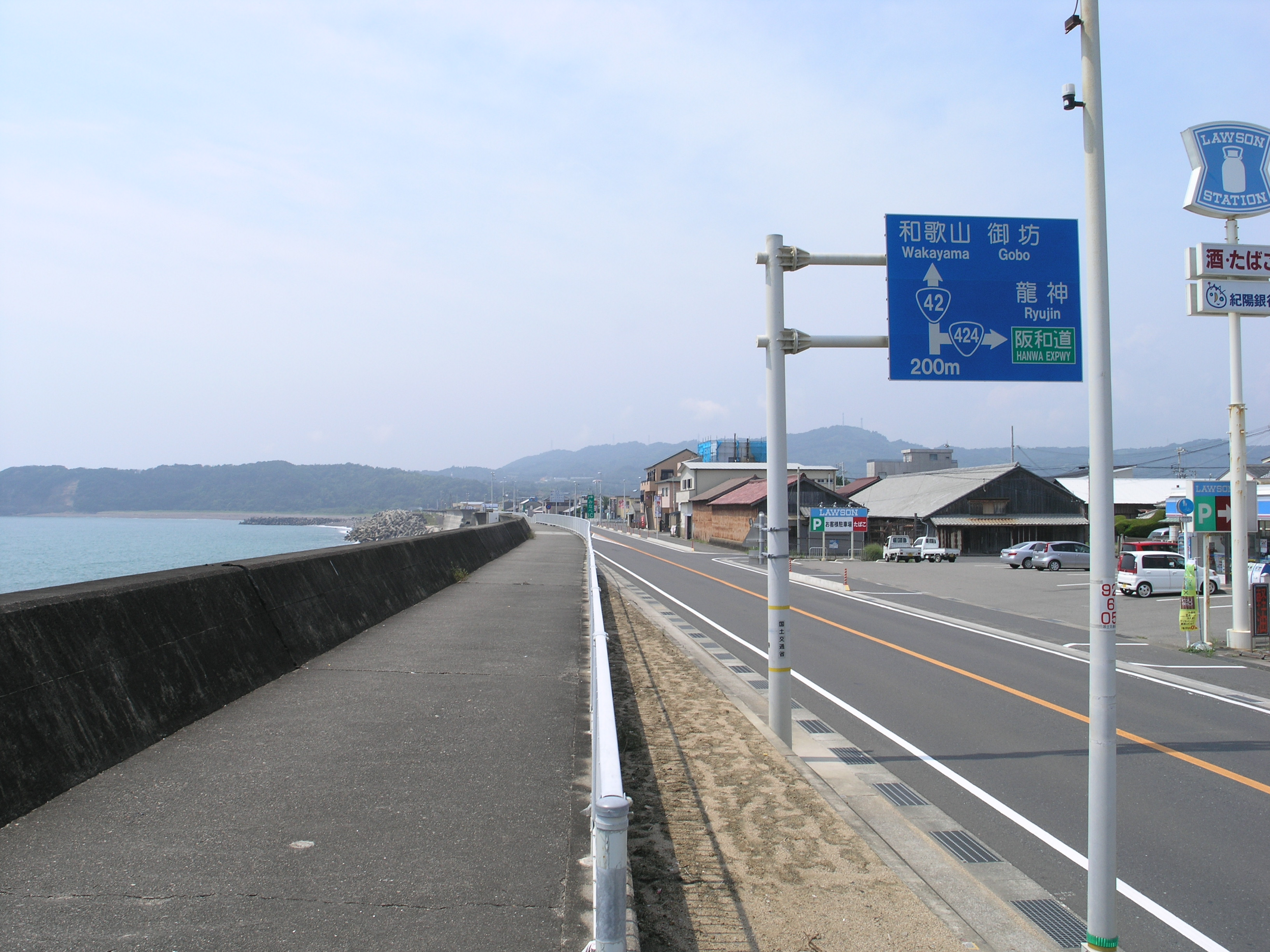 国道42号みなべ交差点（国道424号分岐点）付近 (和歌山県日高郡みなべ町) 2010年08月撮影。 機材：C8080WZ 撮影者：Kansai explorer